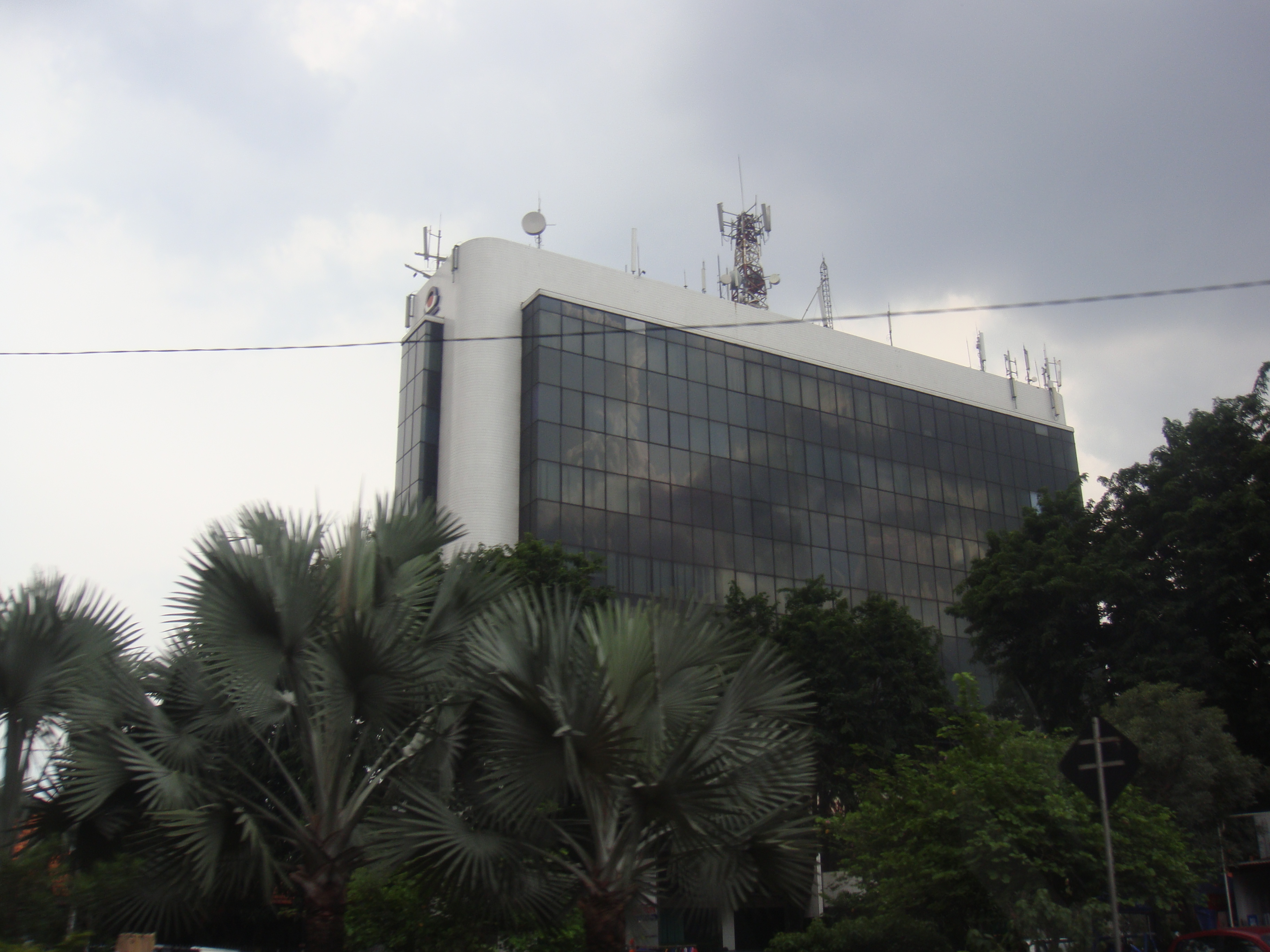 Graha Bumiputera